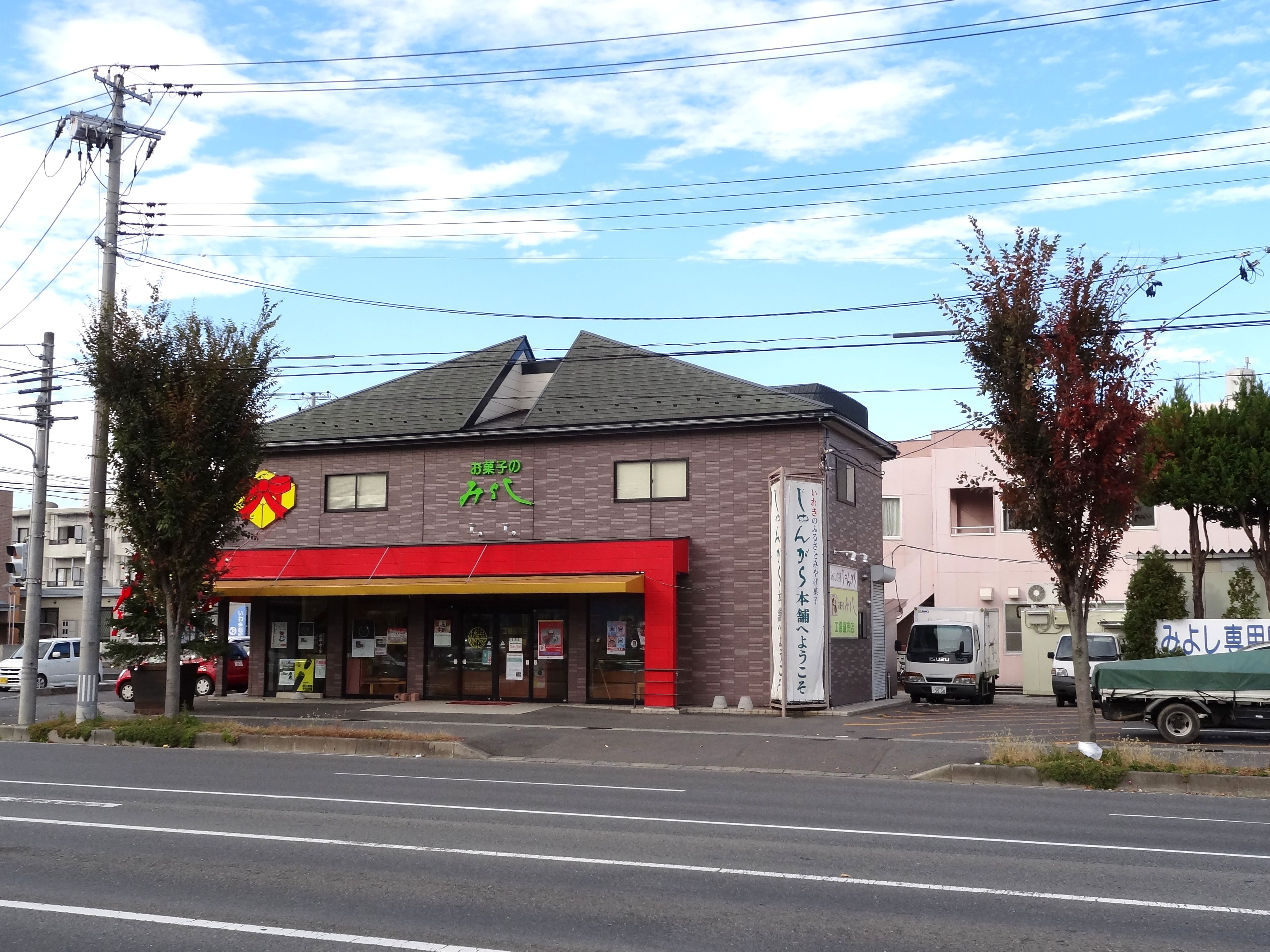 みよし工場直売店